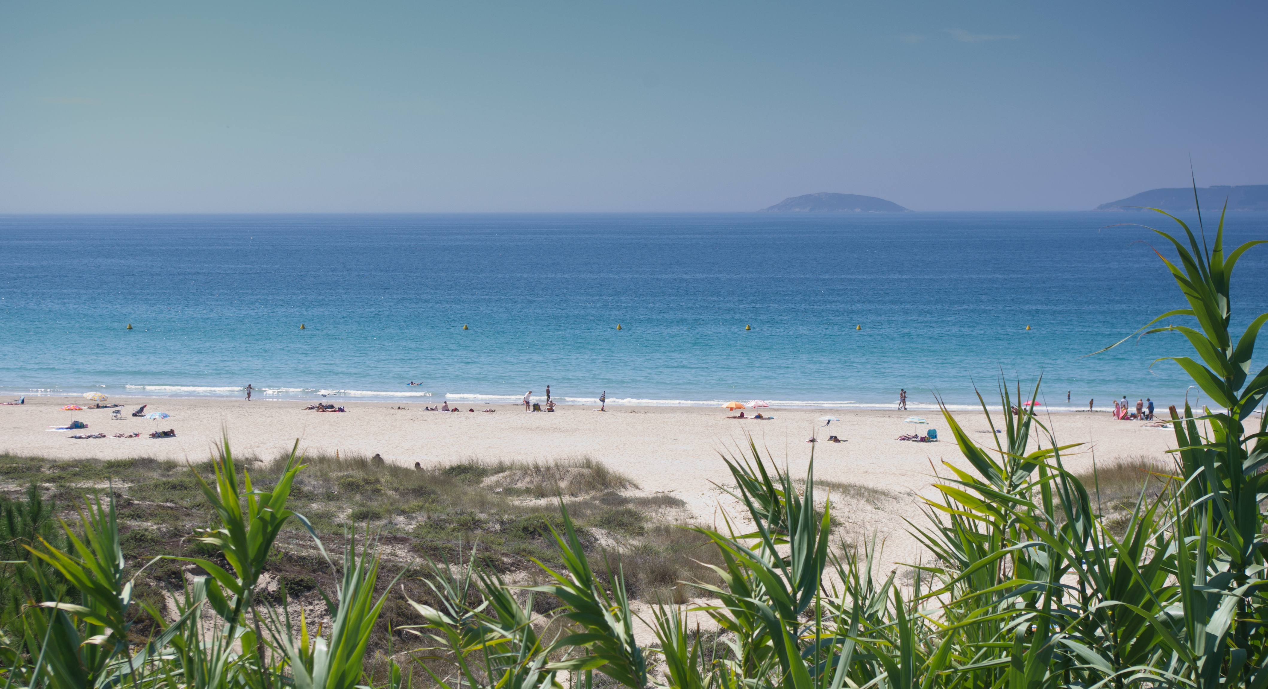 Foto desde el mirador de la playa